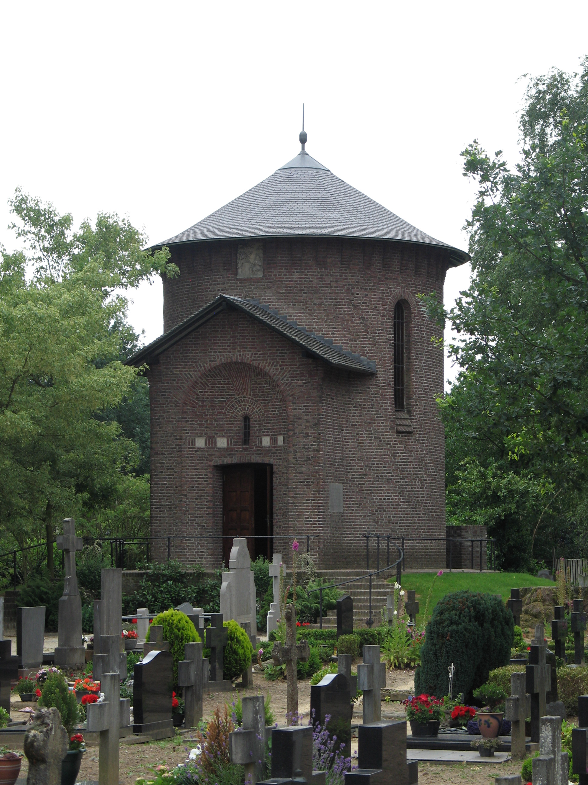 Kapel op terrein - mogelijk monument 520474 (maar is dan foutief in register)